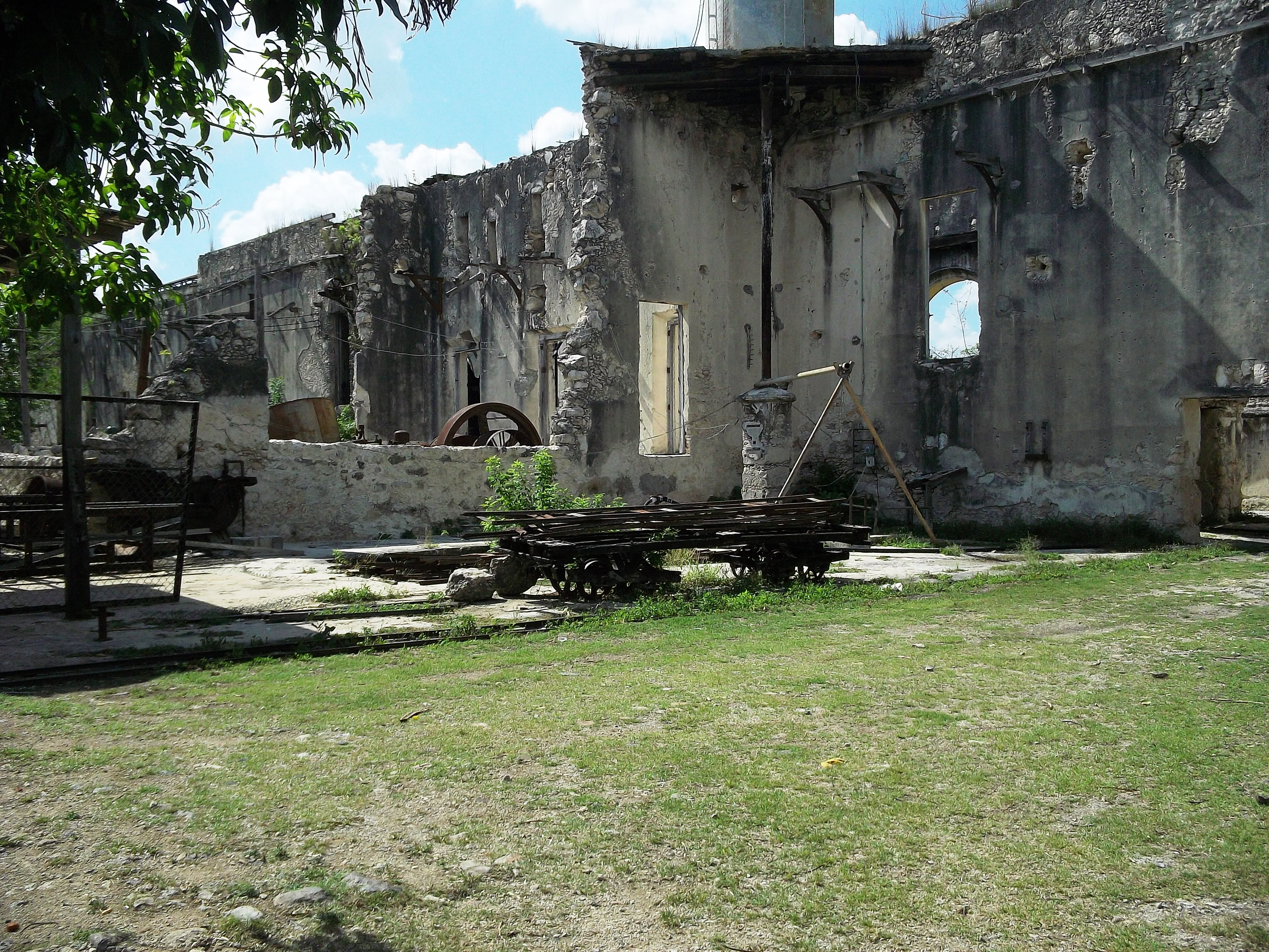 Antigua hacienda de Aké, Yucatán.